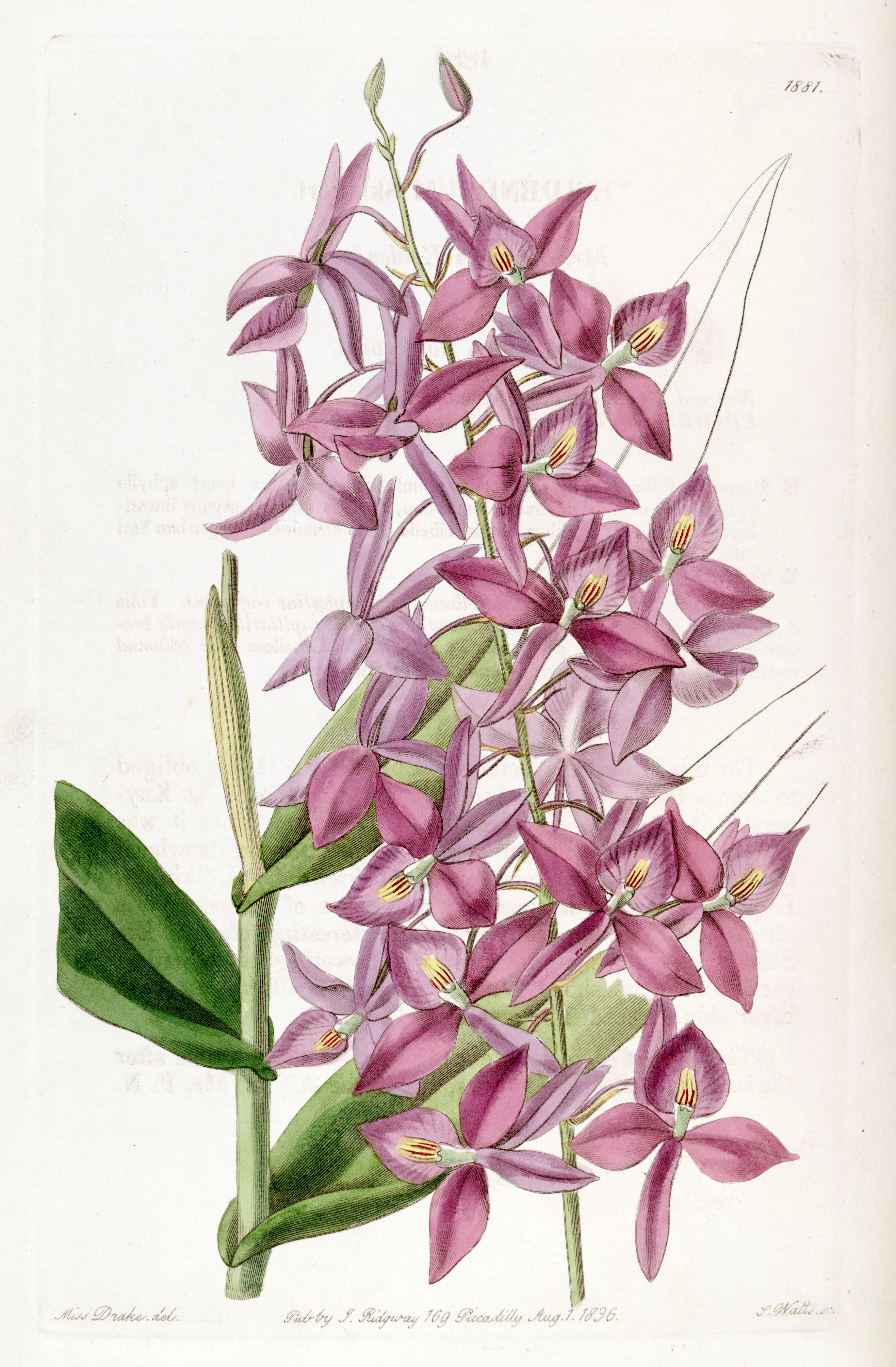 Barkeria skinneri (as syn. Epidendrum skinneri)